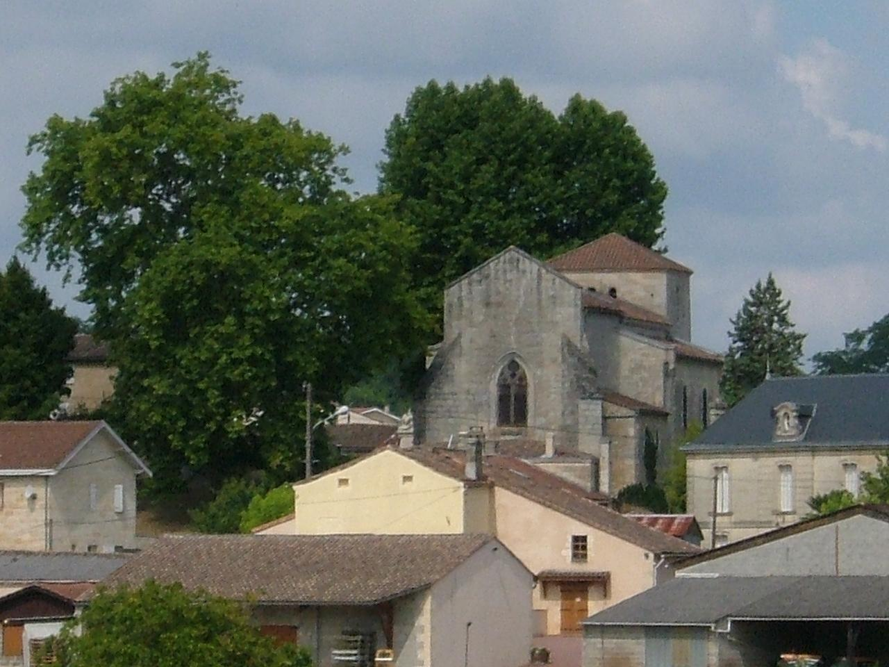 Samonac, Gironde (France); église Saint Martin vue de l'est.